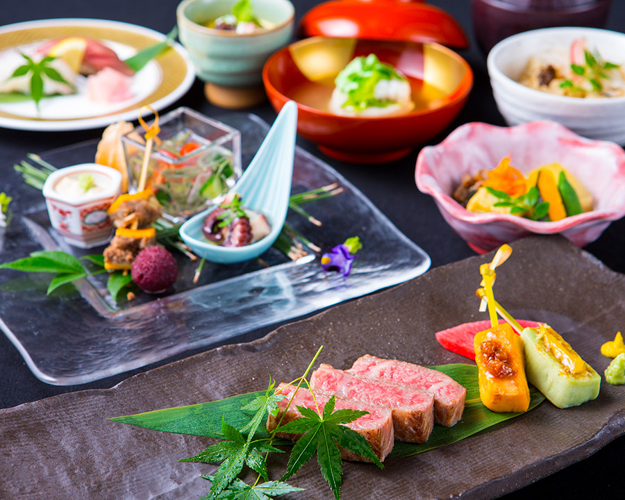 Course of Beef steaks-,head office of Kissho 吉祥吉本店 神戸牛